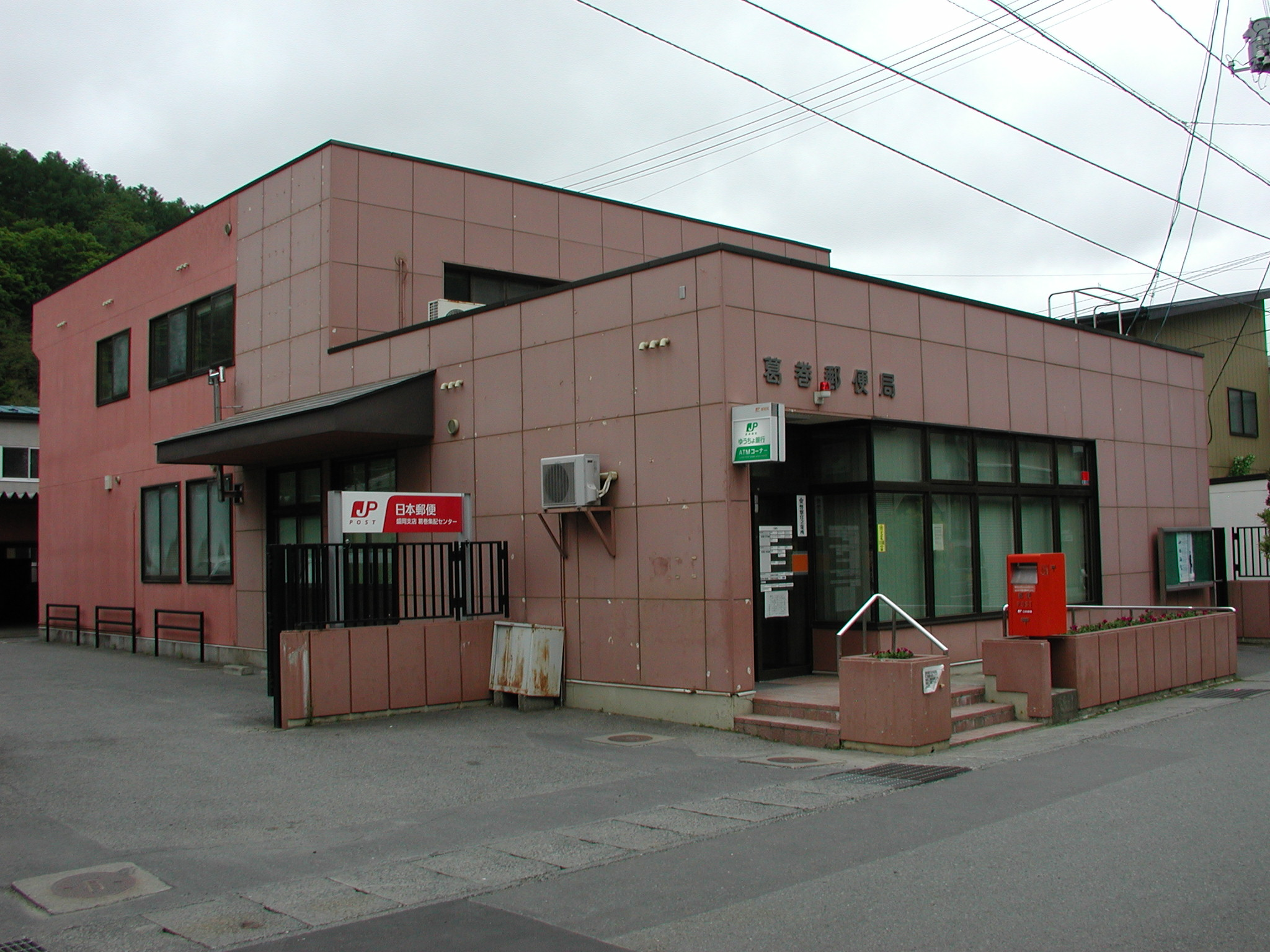 葛巻郵便局 郵便事業盛岡支店葛巻集配センター併設